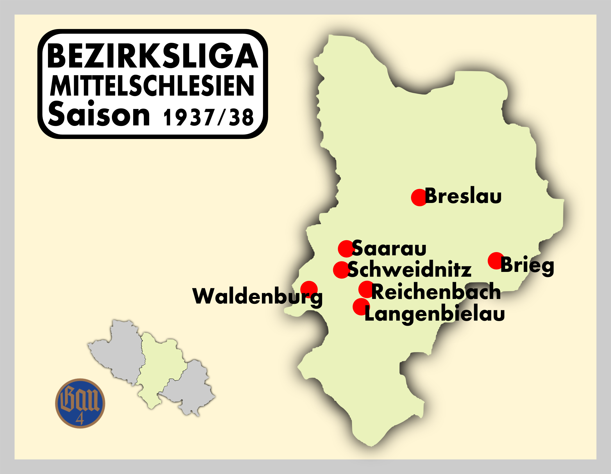 Spielorte der Bezirksliga Mittelschlesien 1937/38.